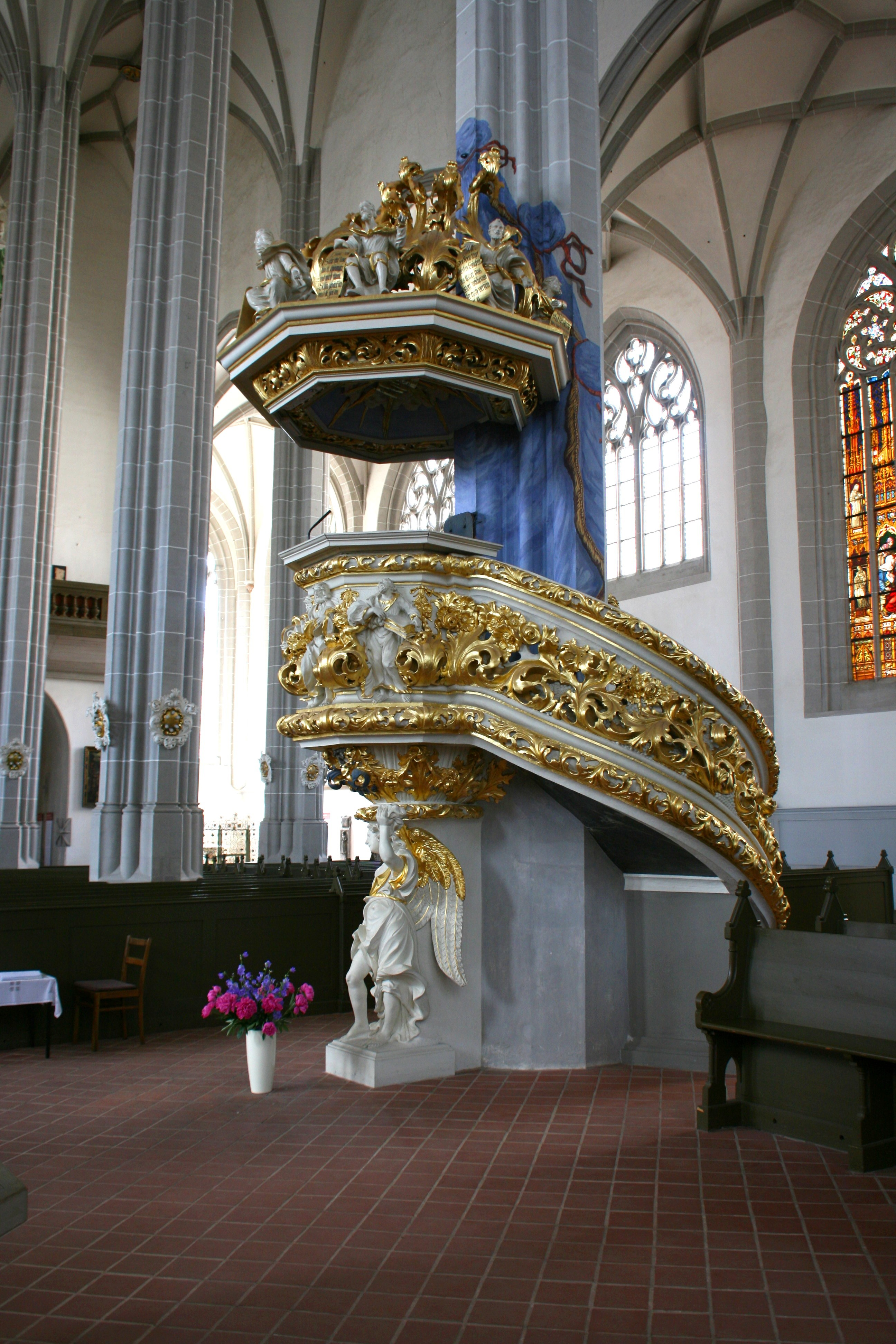 St. Peter und Paul, Bei der Peterskirche in Görlitz